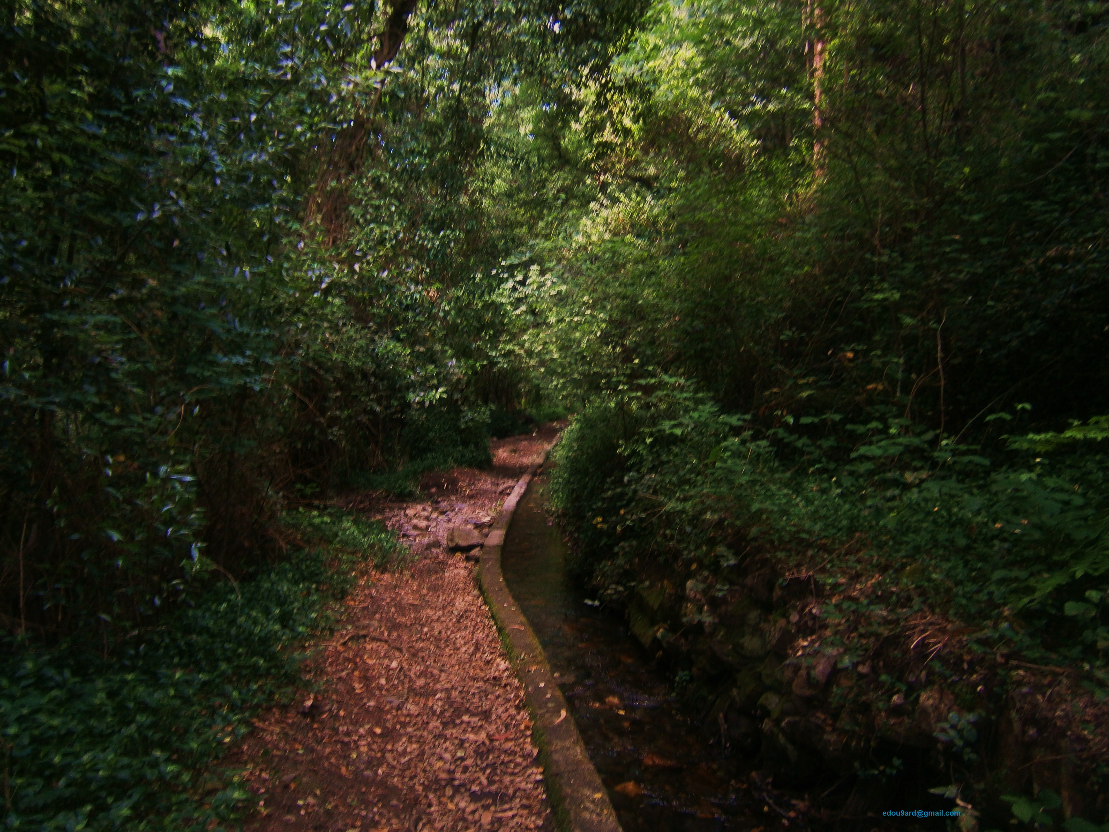 Praia Fluvial das Fragas de S. Simão